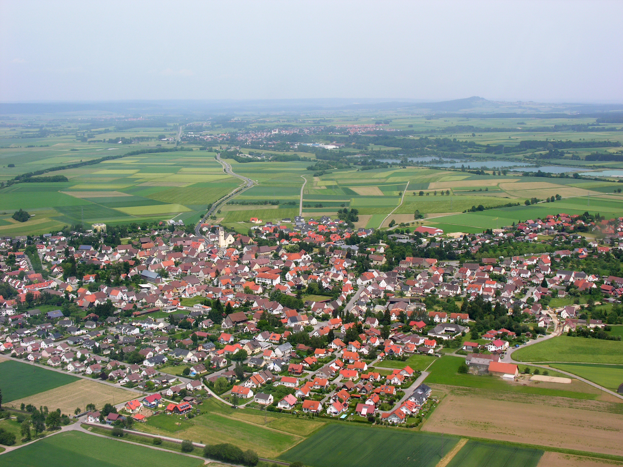 Germany, Baden-Württemberg, Herbertingen